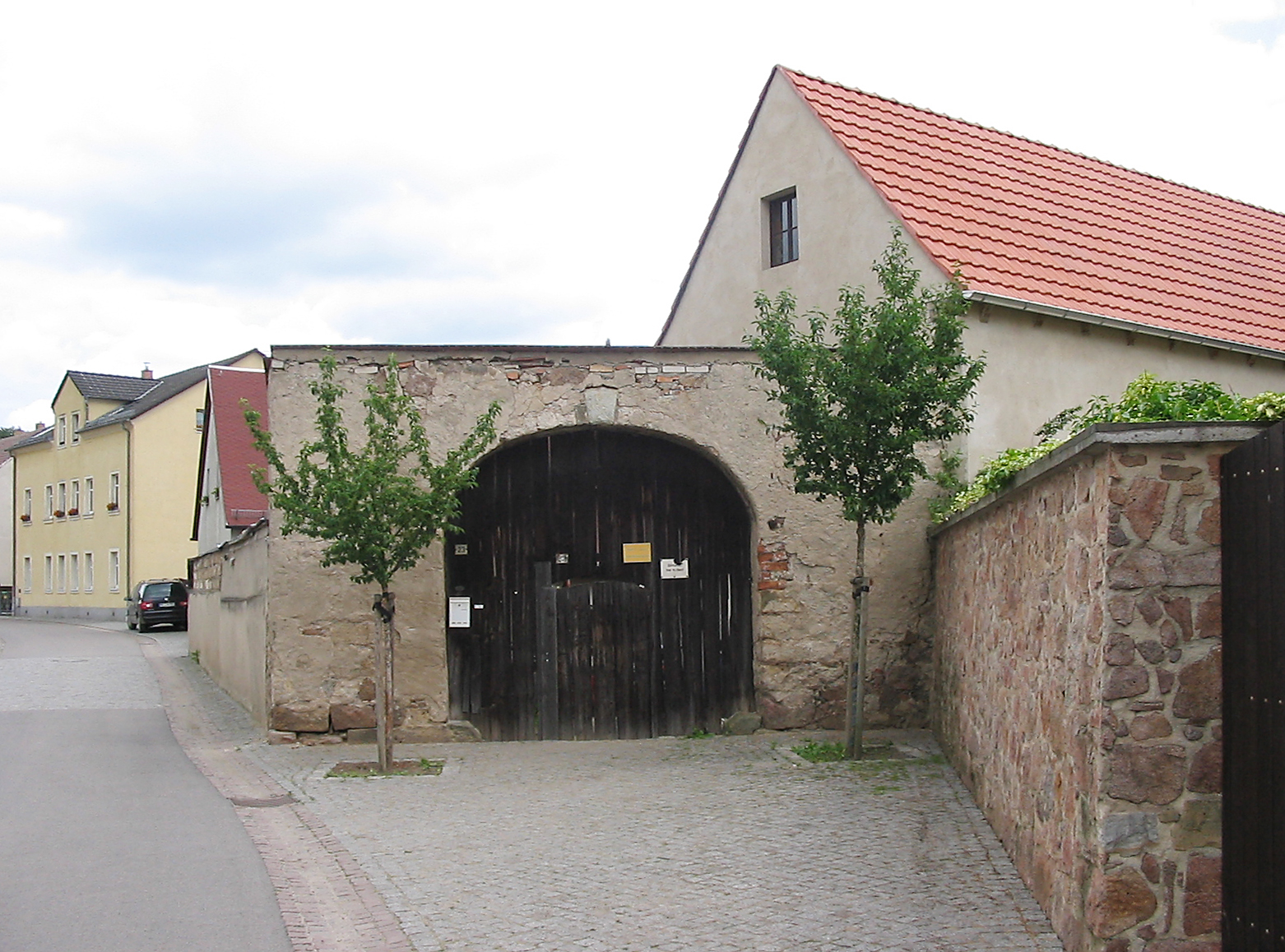 Radebeul, Tor Neue Straße 23